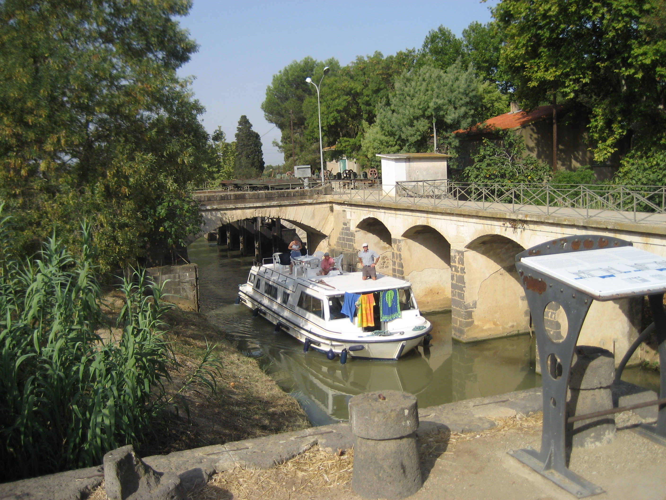 Ouvrage du Libron, Canal du Midi, France